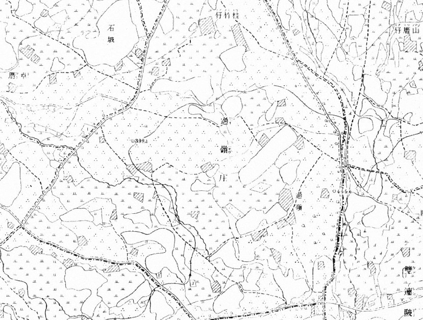 中文（台灣）: 臺灣堡圖－桃園市中壢區過嶺周圍截圖。本圖1904年出版，已超過版權保護期。